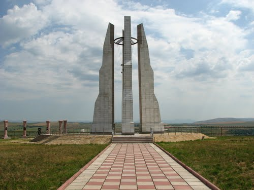 Қазақша (кирил): Сыйқым баба кесенесі